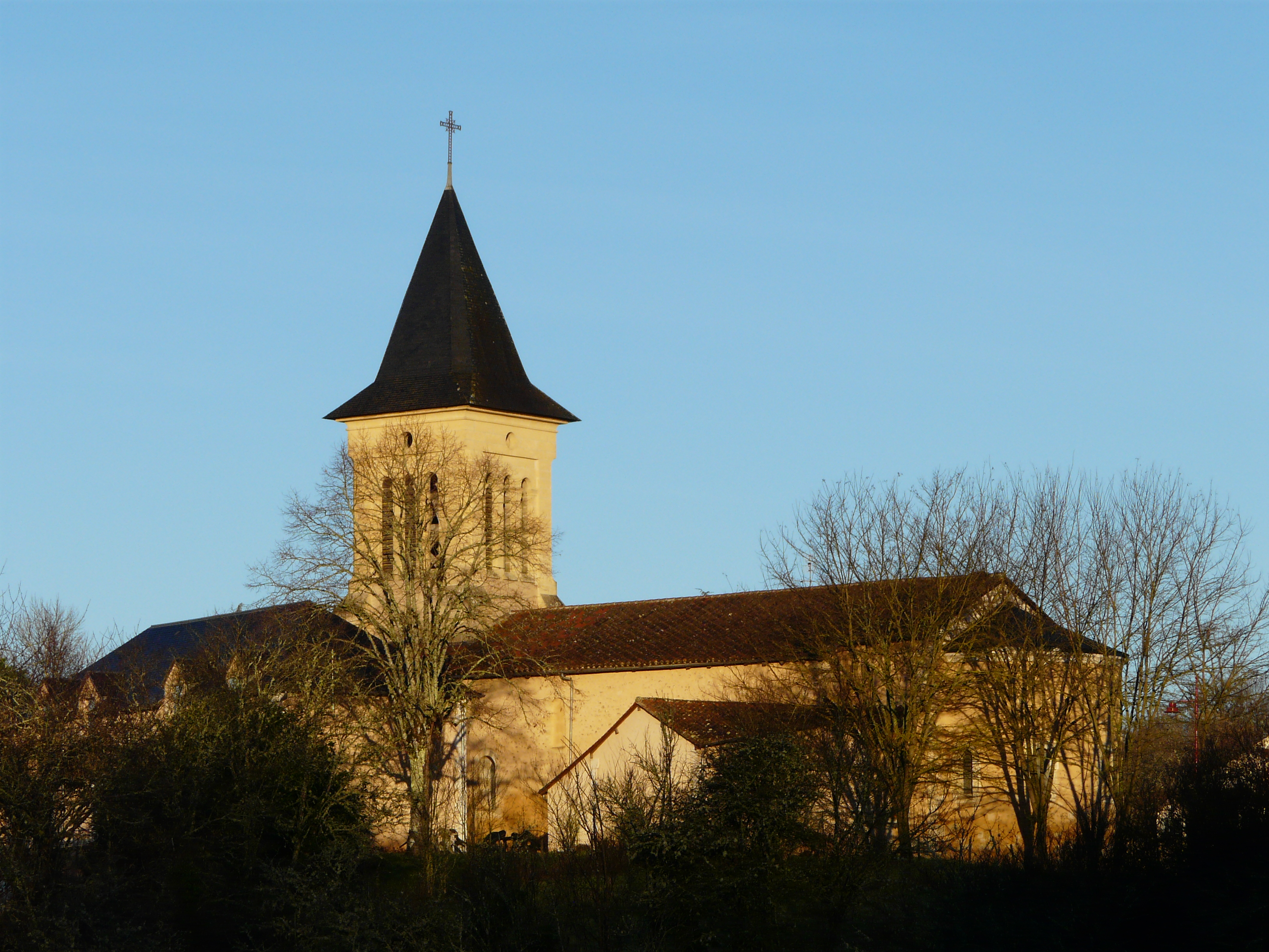 L'église Saint-Agnan de Lacropte, Dordogne, France.